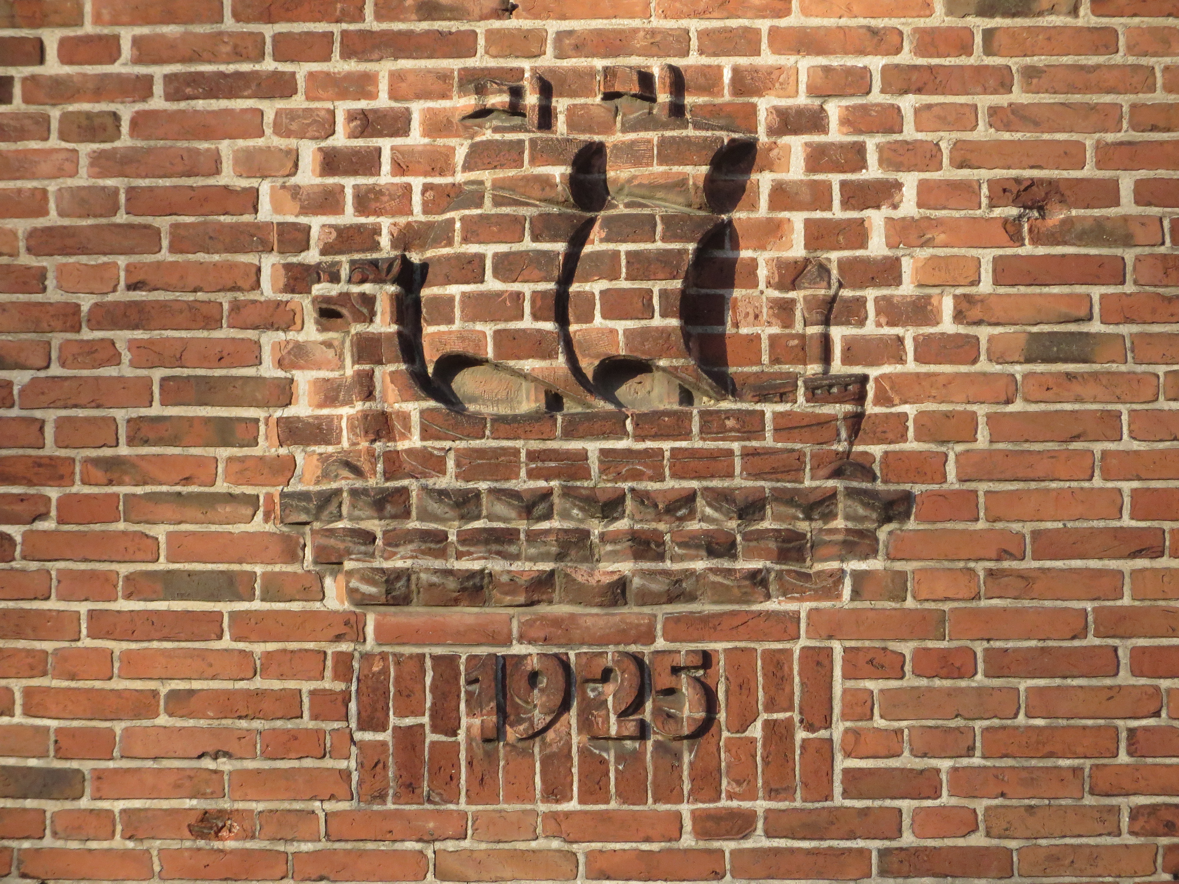 Schiff beim Parkhof (Flensburg), Bild 05